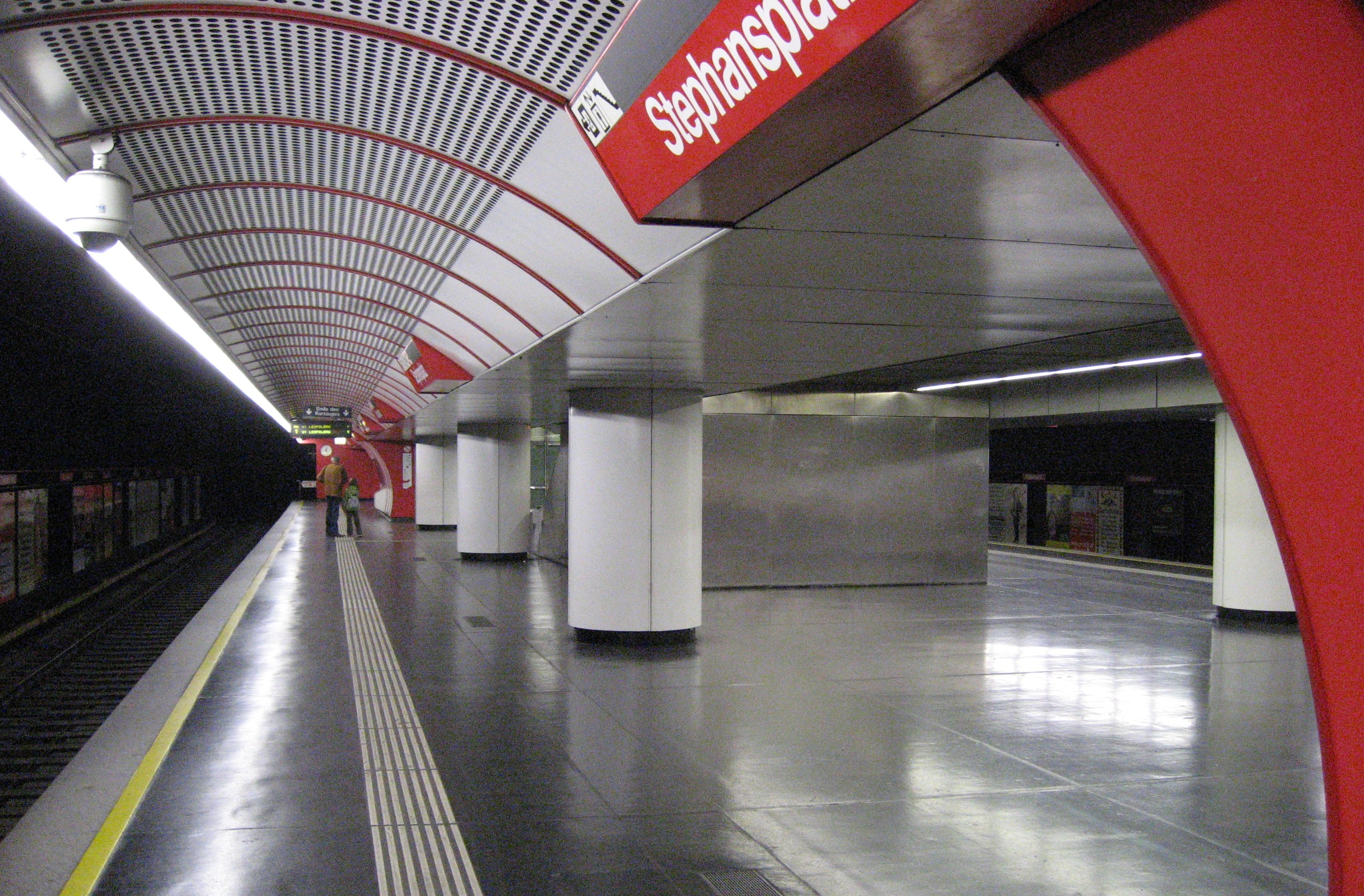 Wien, U-Bahn-Station Stephansplatz